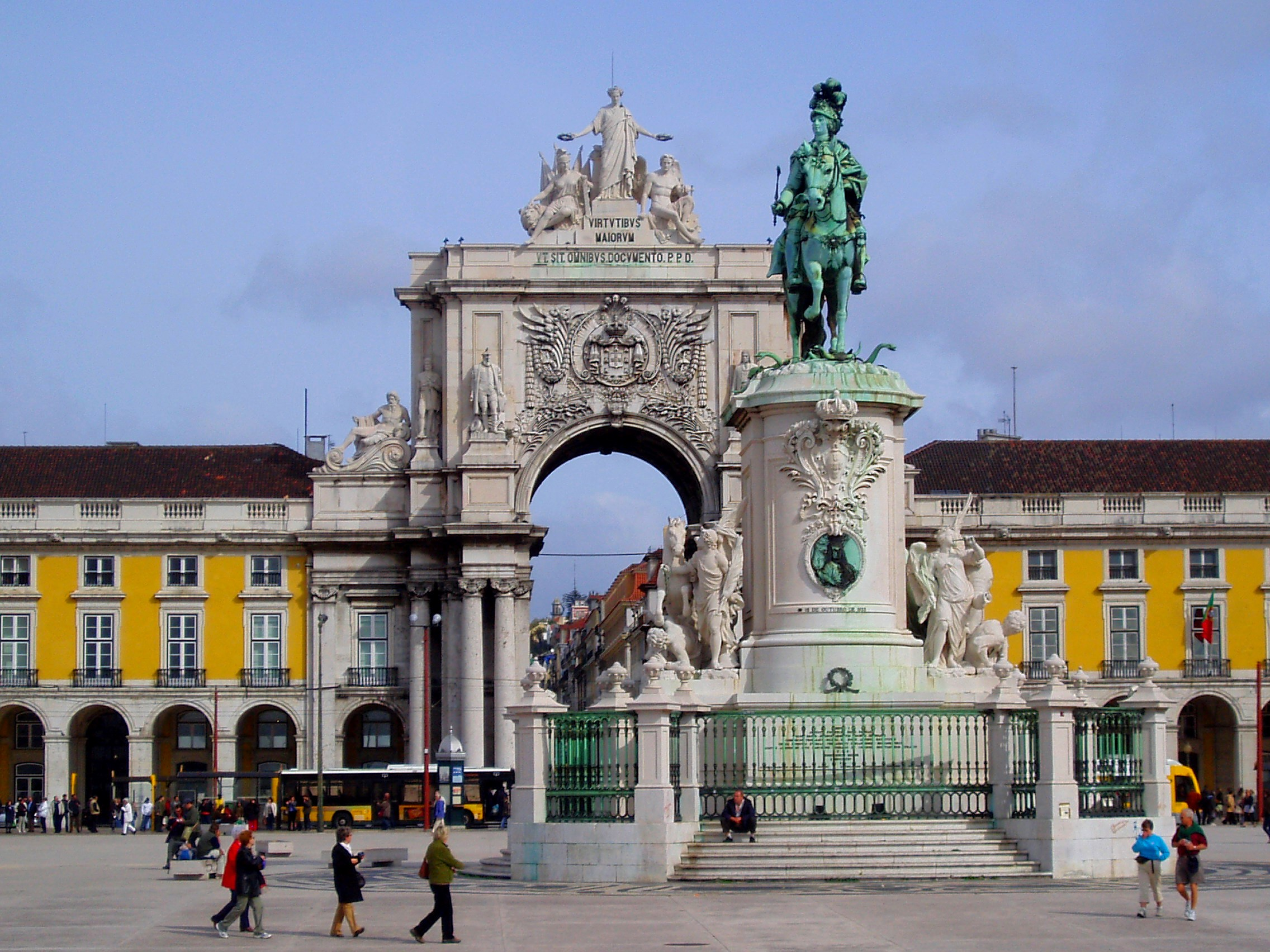 Praça do Comércio square. The statue is of King José I.